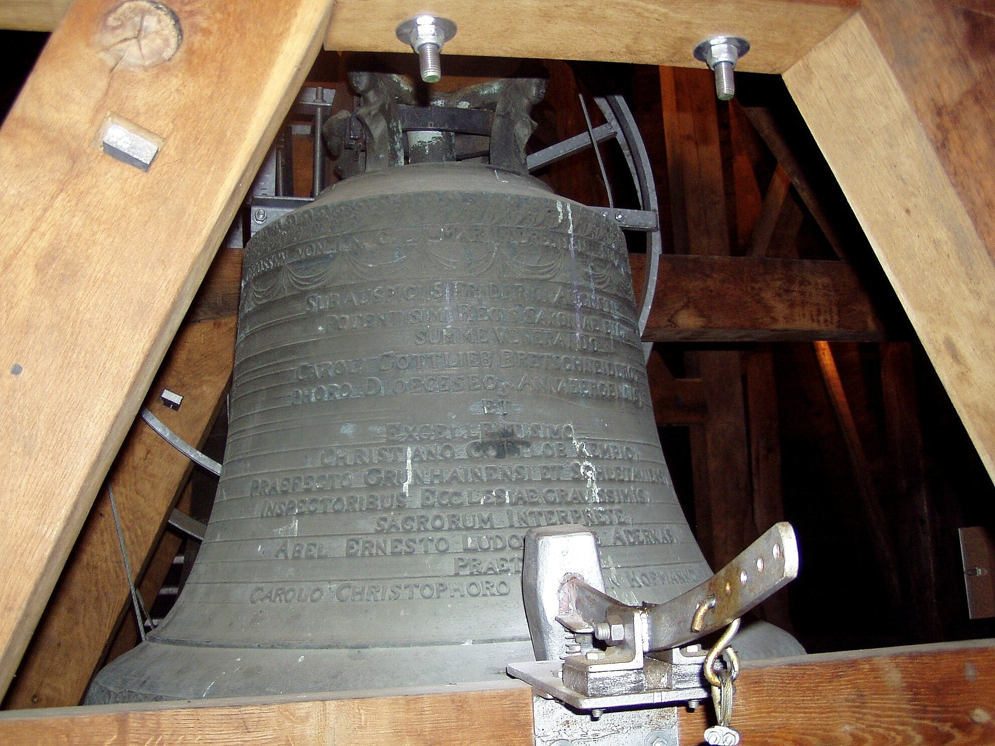 Mittlere Glocke der Nicolaikirche in Grünhain, Gussjahr 1810